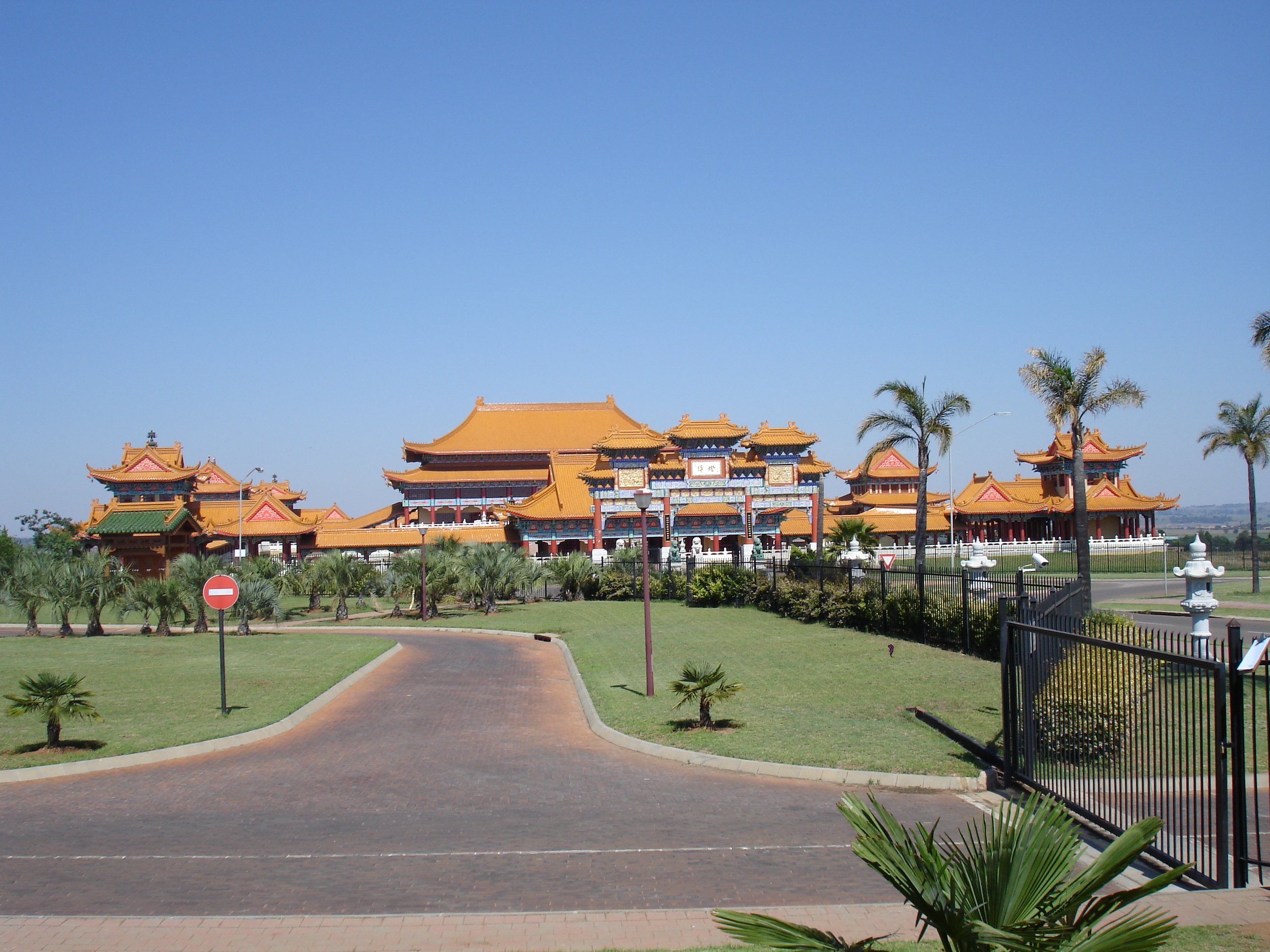 Nan Hua temple